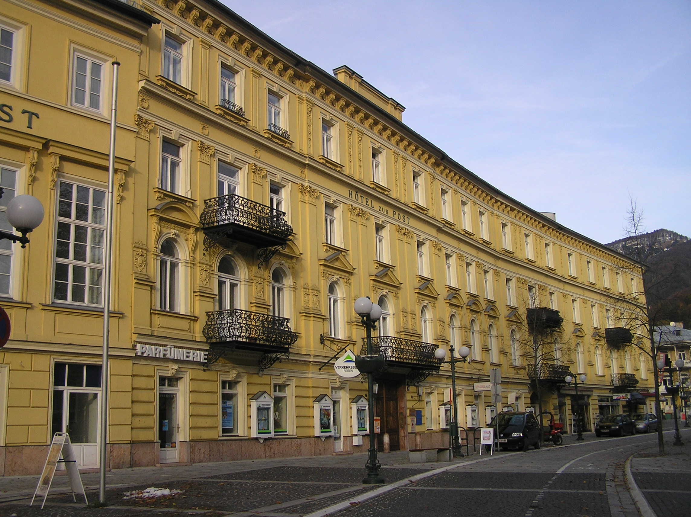 Ehemaliges Hotel Post in Bad Ischl, Oberösterreich. Selbst fotografiert am 11.11.2006 durch Dr. Wolfgang Perr